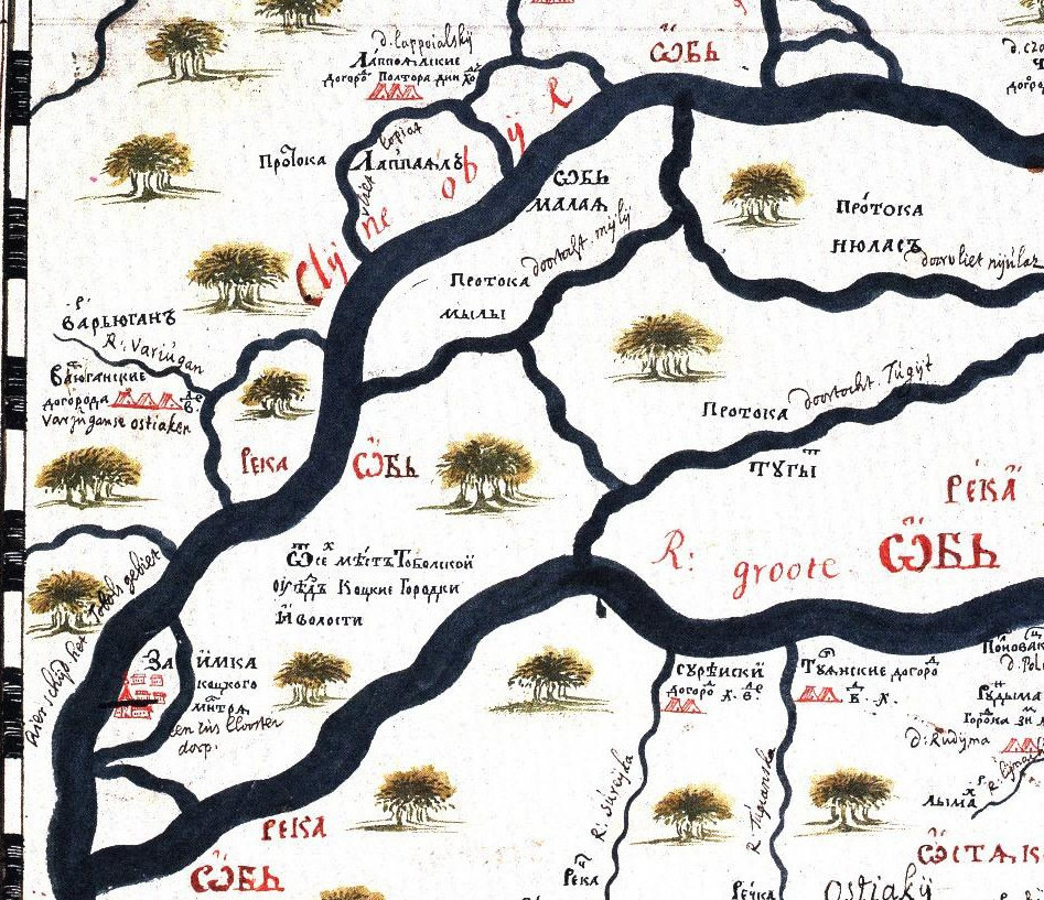 Чертёж земель Берёзовского края (карта). Лист 8